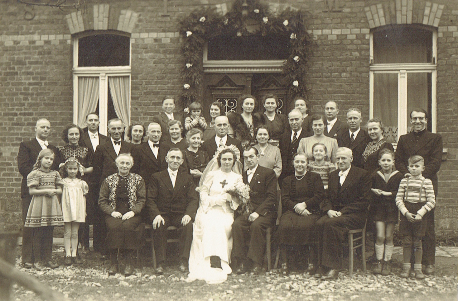 Hochzeitsgesellschaft bei der Vermählung des Müllerssohns Hans Müller mit Gertrud Court am 10.01.1948